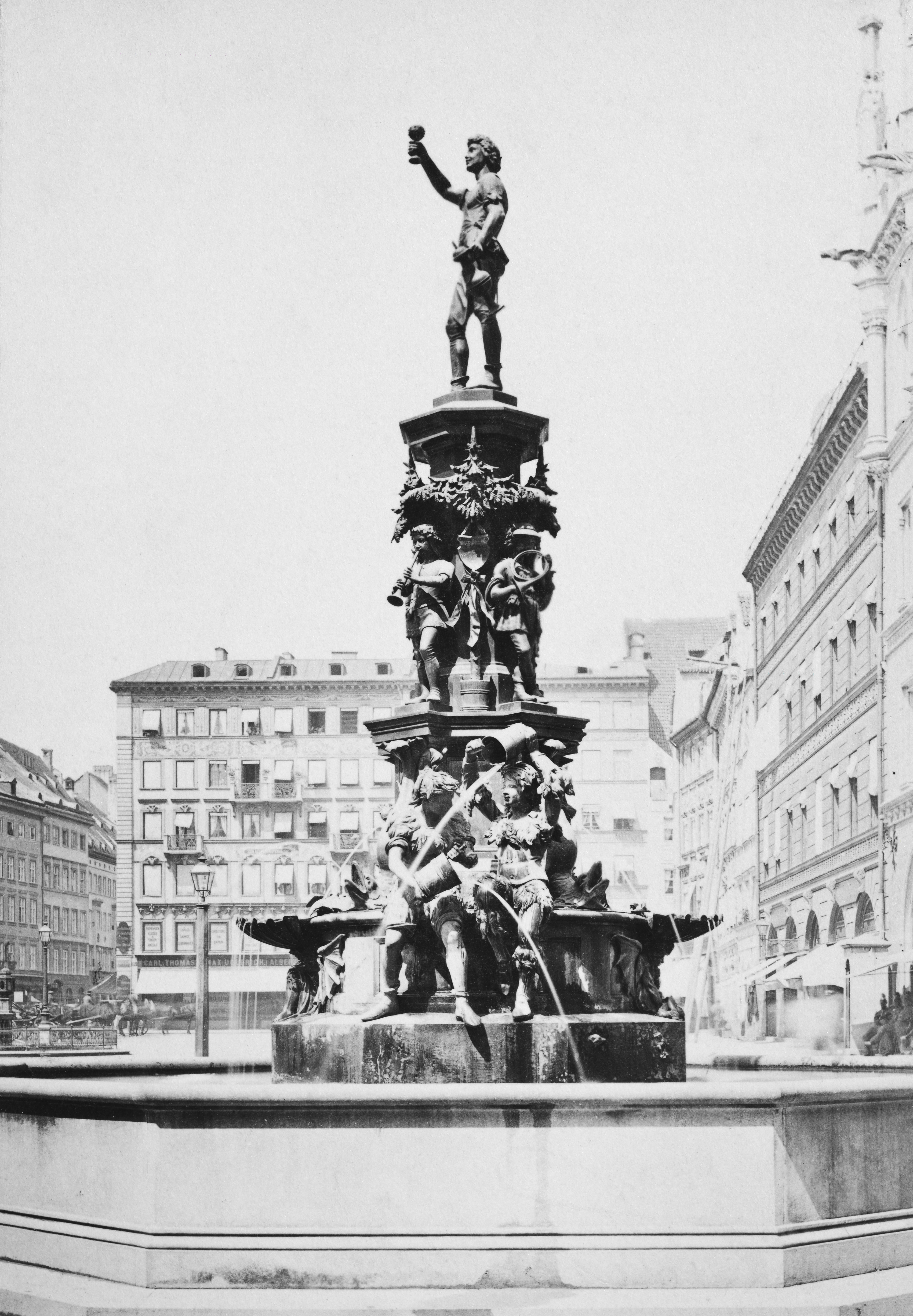 Blick auf den von Conrad Knoll im Jahr 1865 vollendeten, und im 2. Weltkrieg zerstörten, Brunnen vor dem Neuen Rathaus auf dem Marienplatz in München.